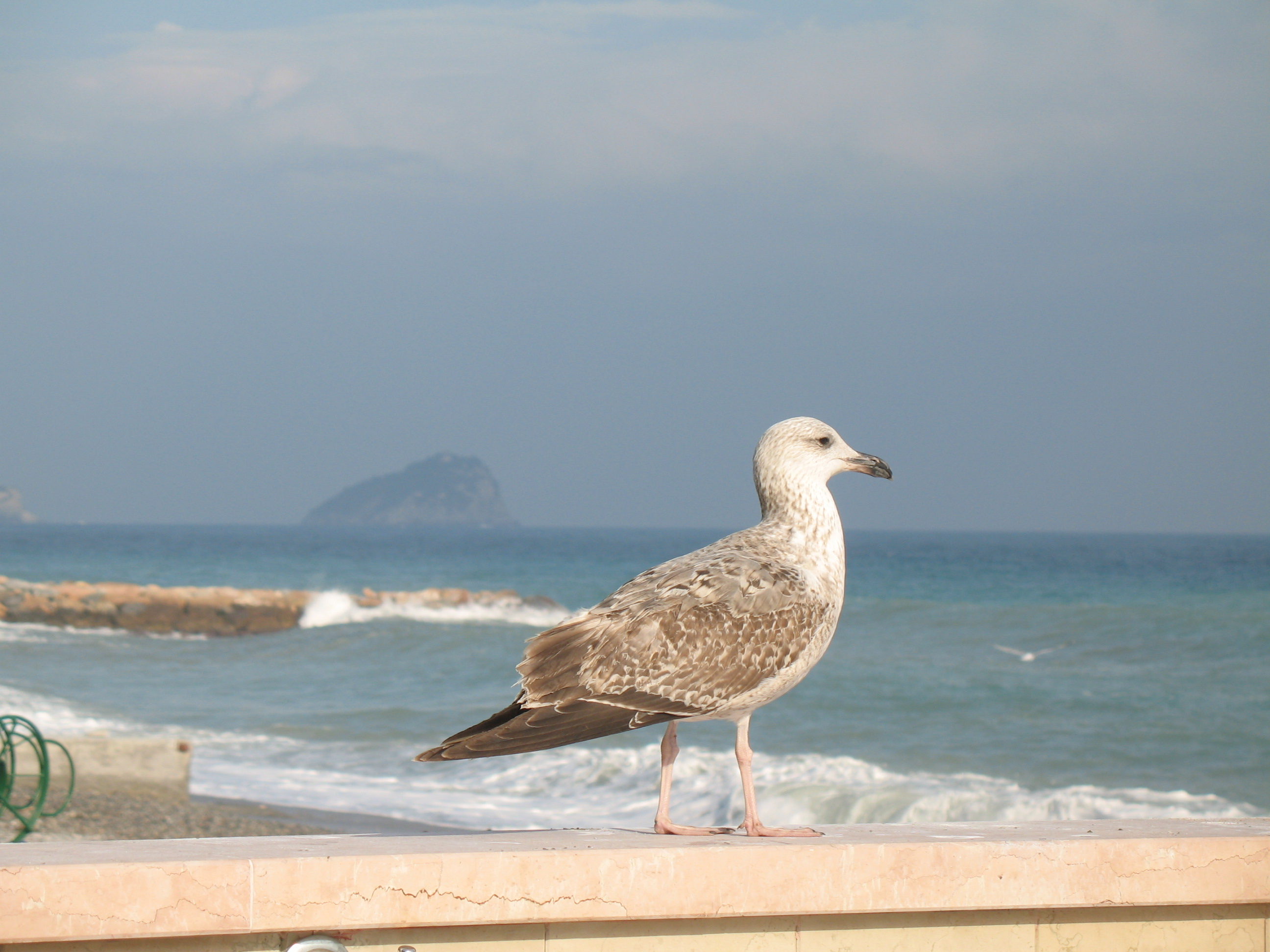 Larus michahellis. Serie di Immagini da Noli in provincia di Savona